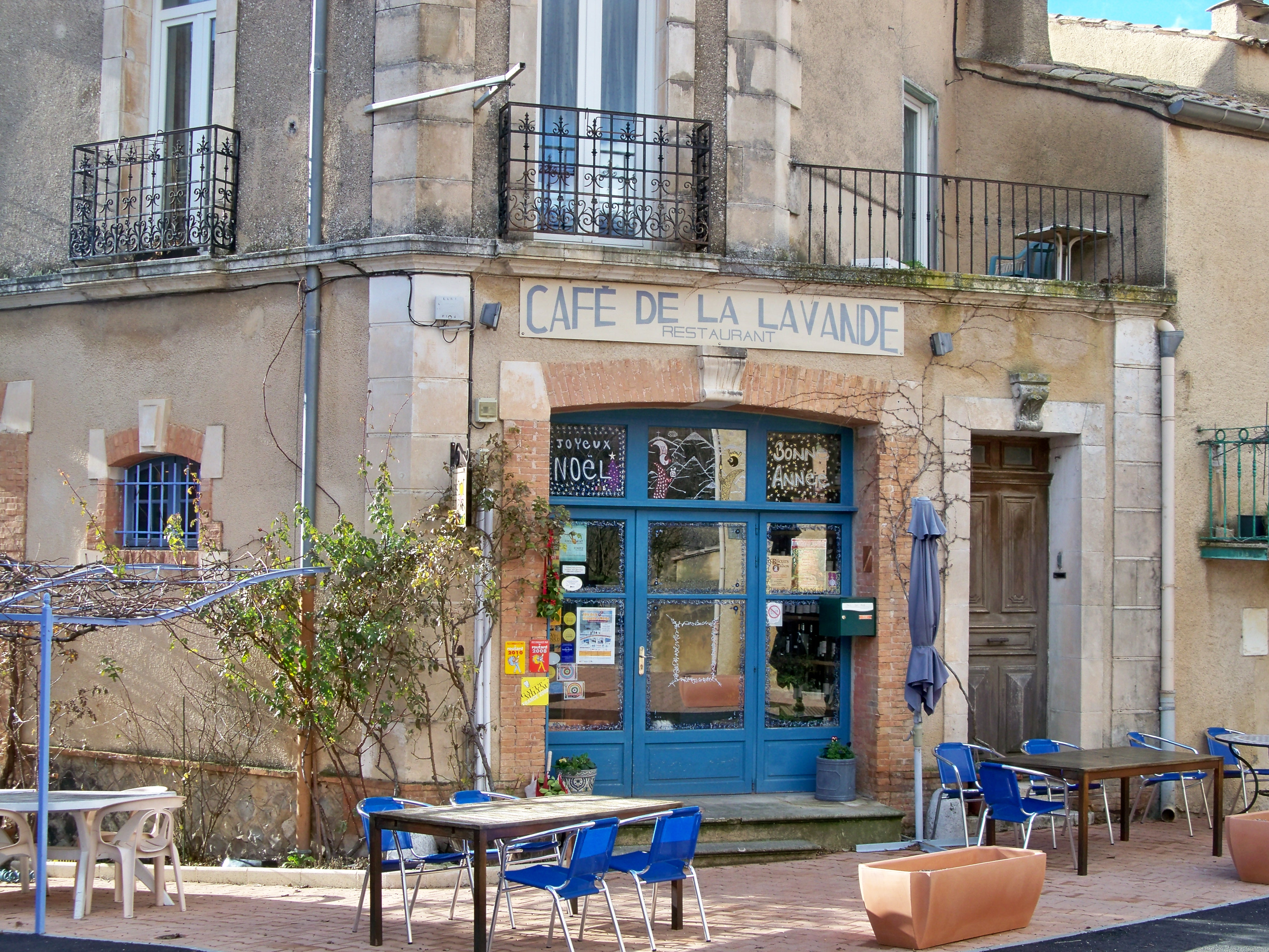 café de la lavande, bistrot de pays de Lardiers (04)